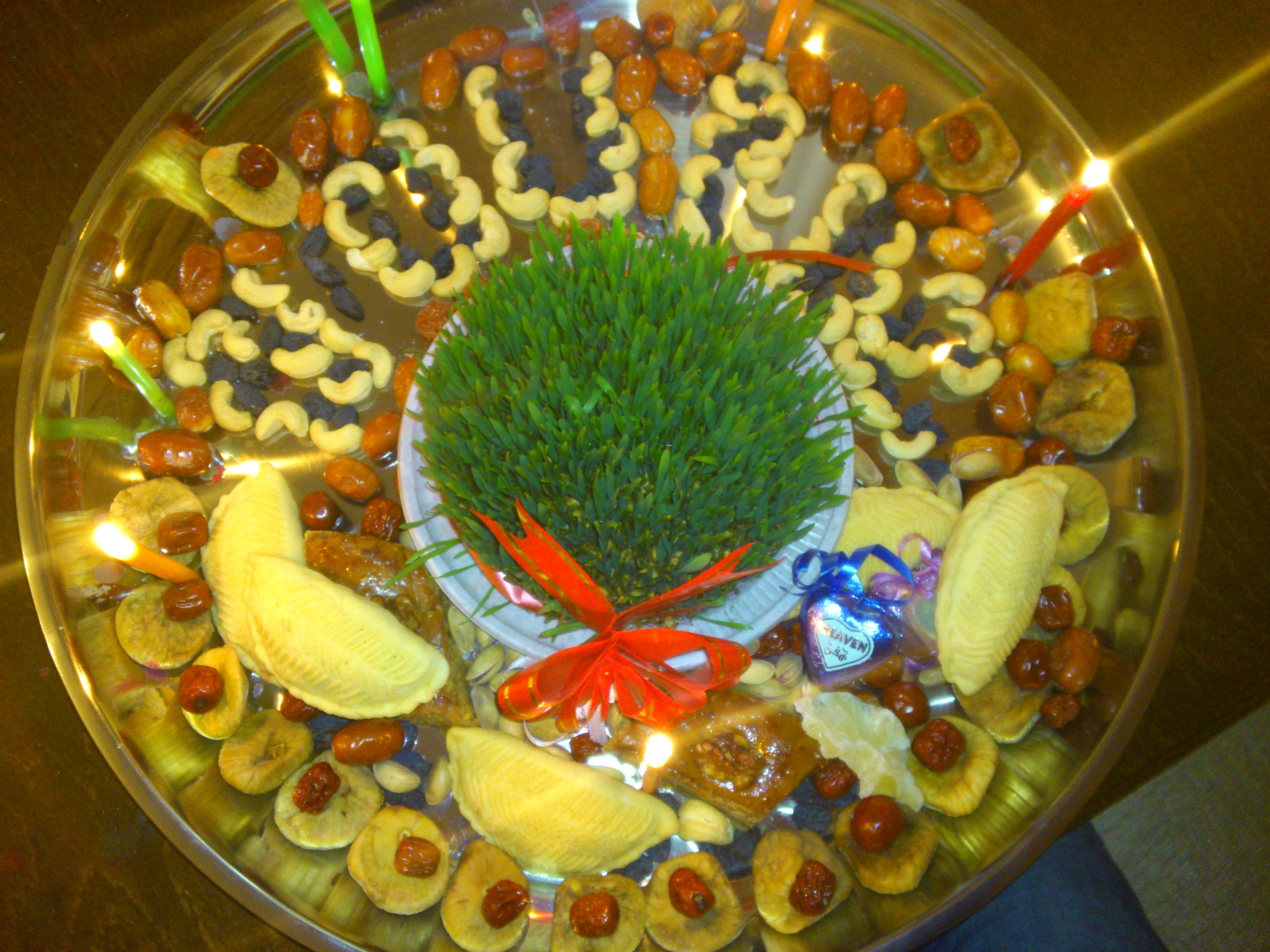 Novruz xonçası